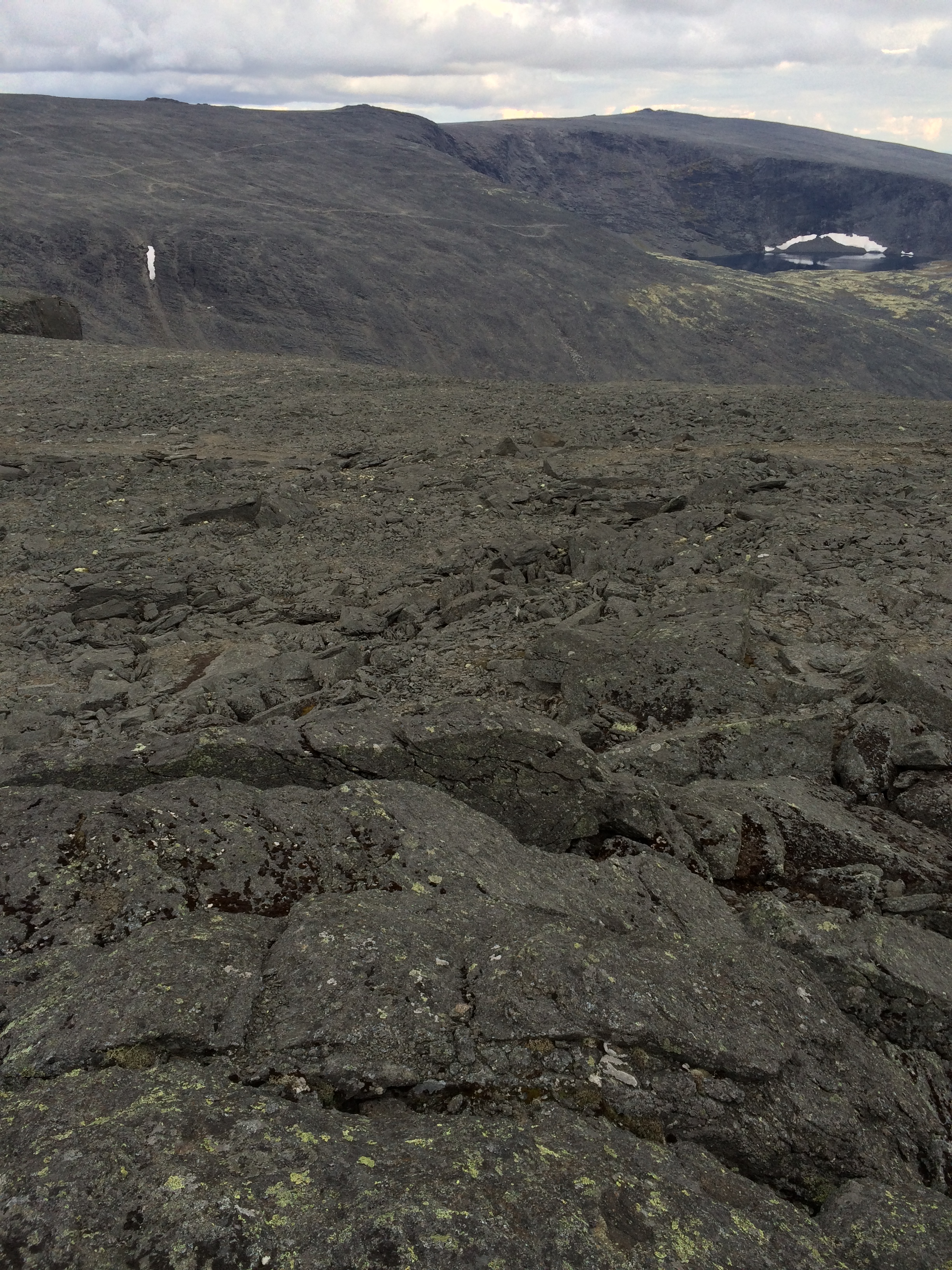 Аллуайв